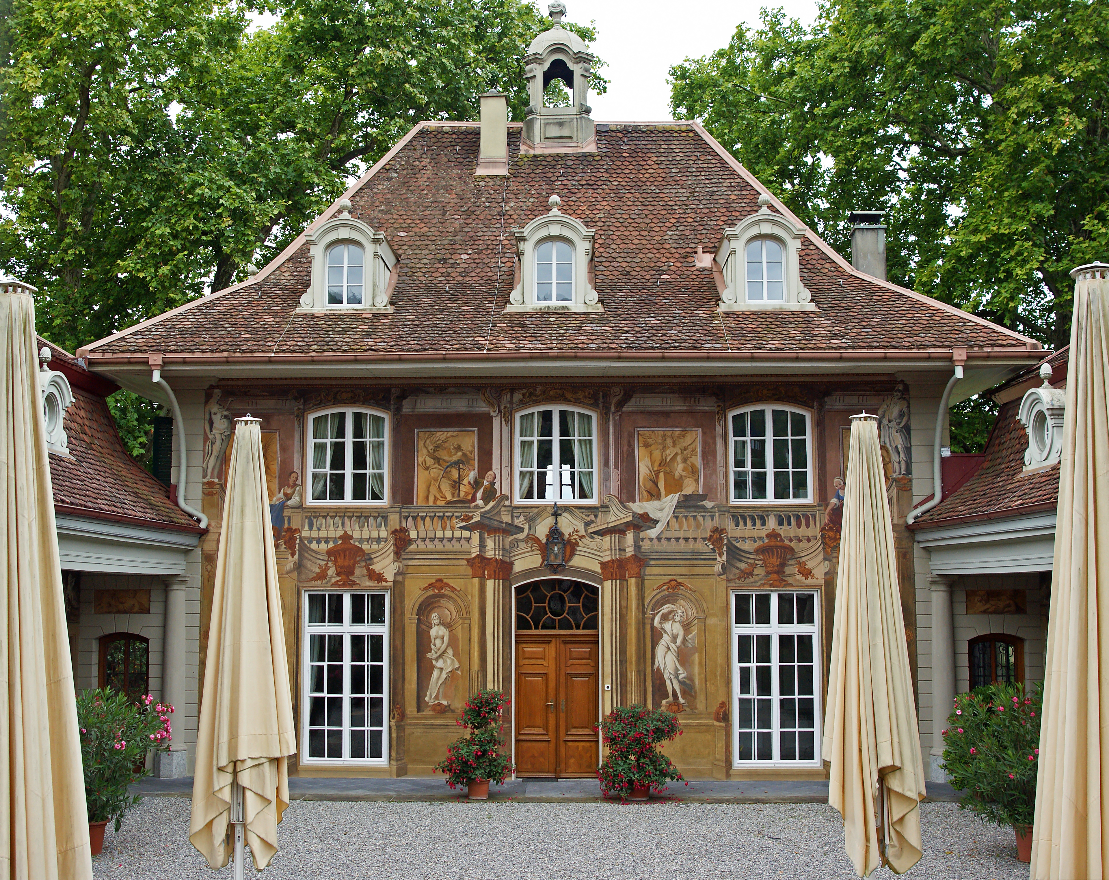 Hofgut (Schloss) in Gümligen, Eingangsfront mit Malereien